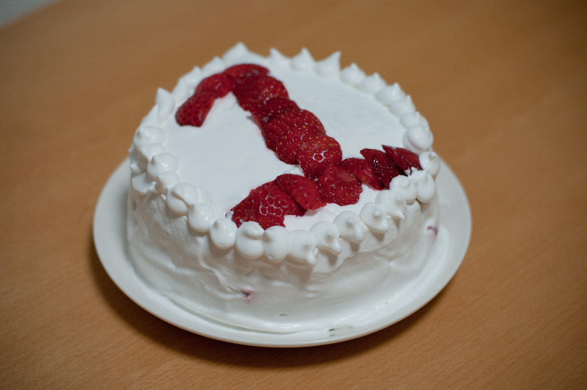 1st Bithday Cake かみさん作の次男１歳の誕生日ケーキです。牛乳＆卵アレルギー対策済み。 K20D, FA50/1.4